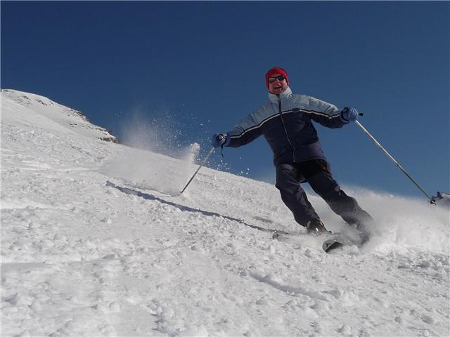 Skieur faisant du ski sur de la neige blanche